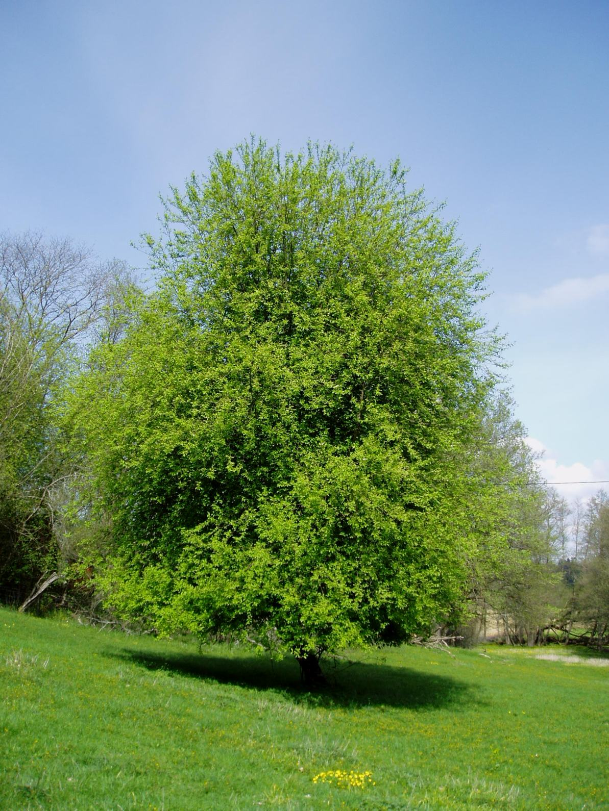 Prunus padus in Sweden